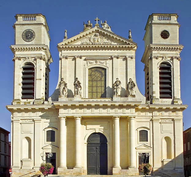 Cathédrale Notre-Dame-de-l'Assomption